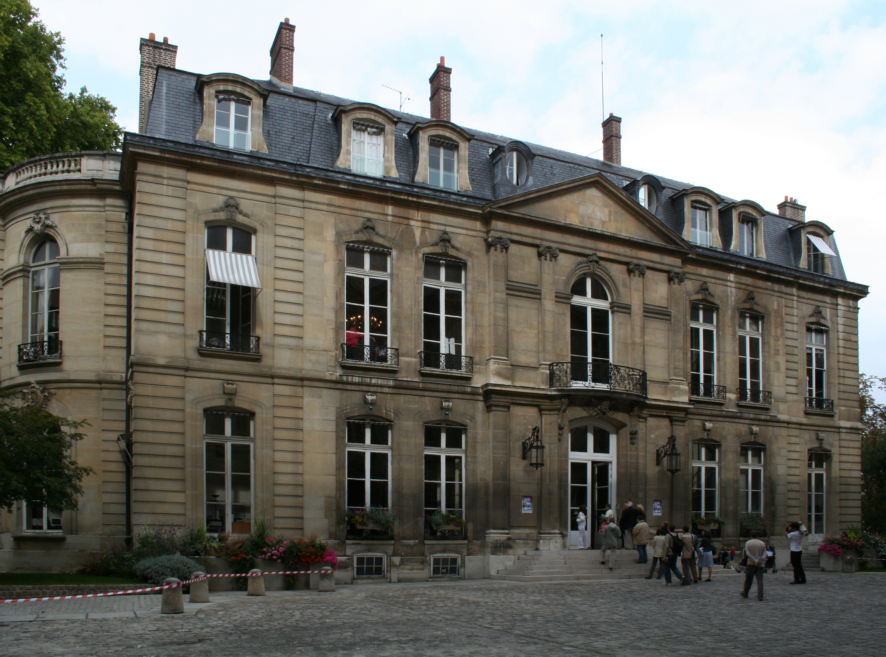 Façade sur cour de l'ancien hôtel de Villeroy (actuel ministère de l'Agriculture), 78 rue de Varenne.